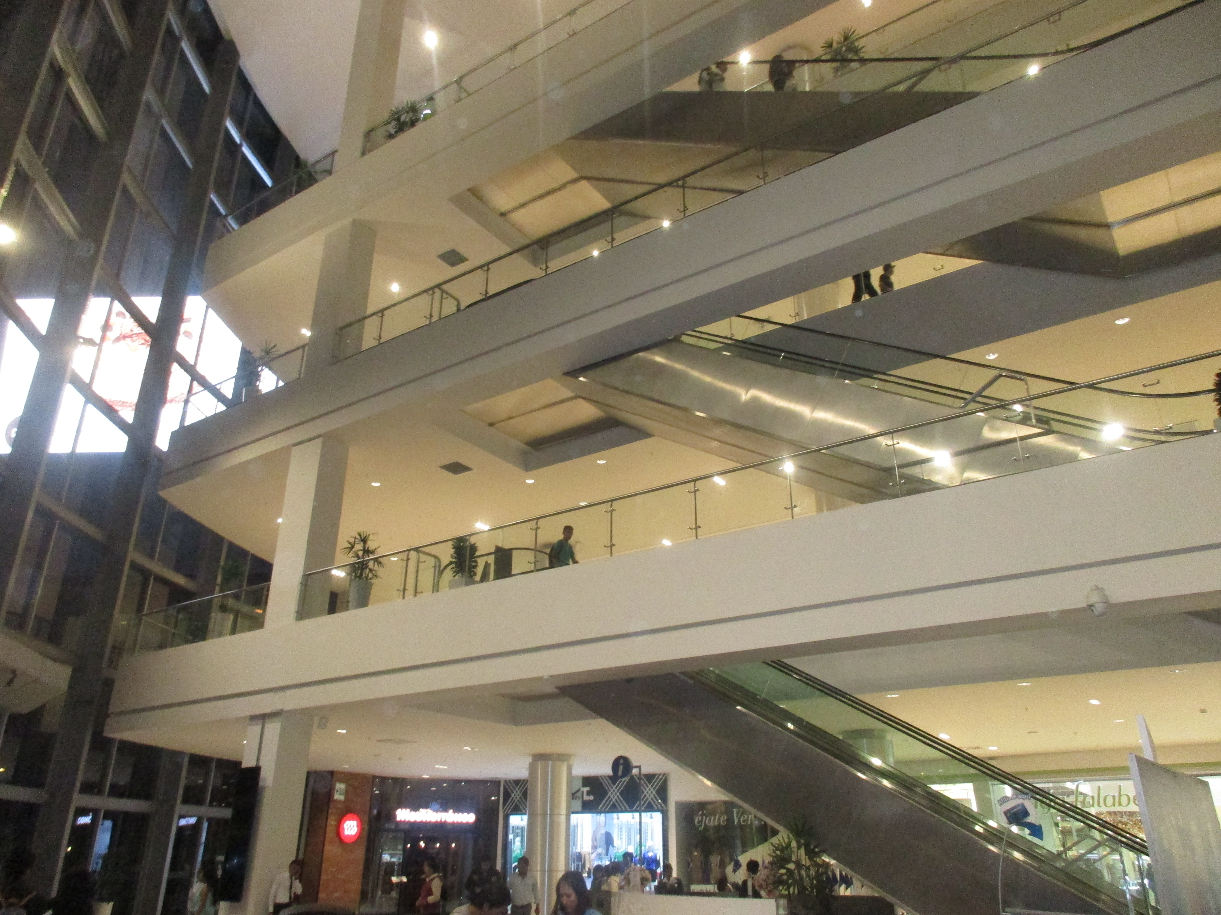 Interiores del centro comercial Mall del Sur Lima